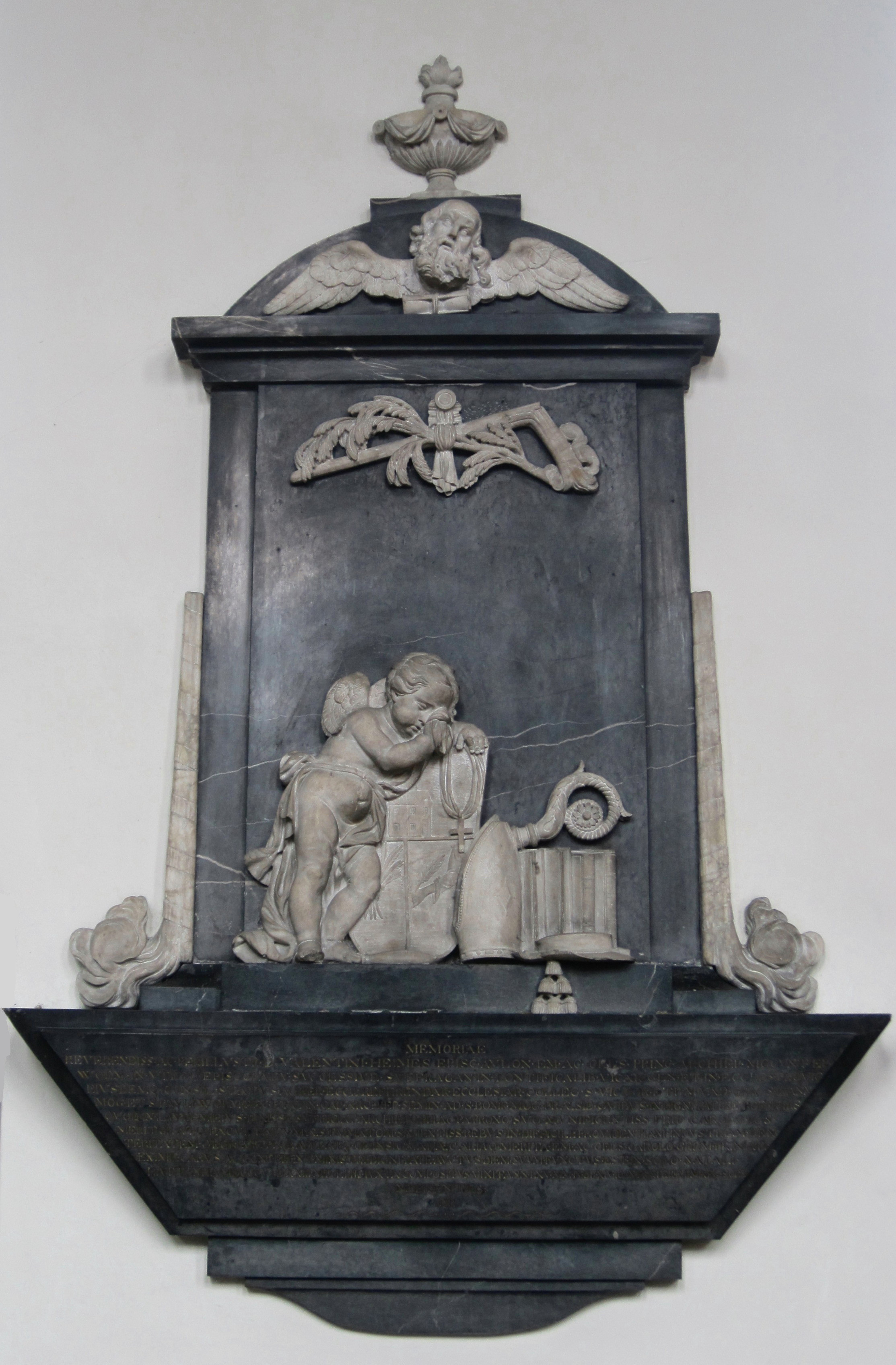 Wandgrab Johann Valentin Heimes (* 11. März 1741 in Hattenheim; † 23. Juli 1806 ebenda), Weihbischof von Mainz. Kath. Kirche St. Vincentius, Hattenheim im Rheingau. Gefertigt in ehemals schwarzem Lahnmarmor.